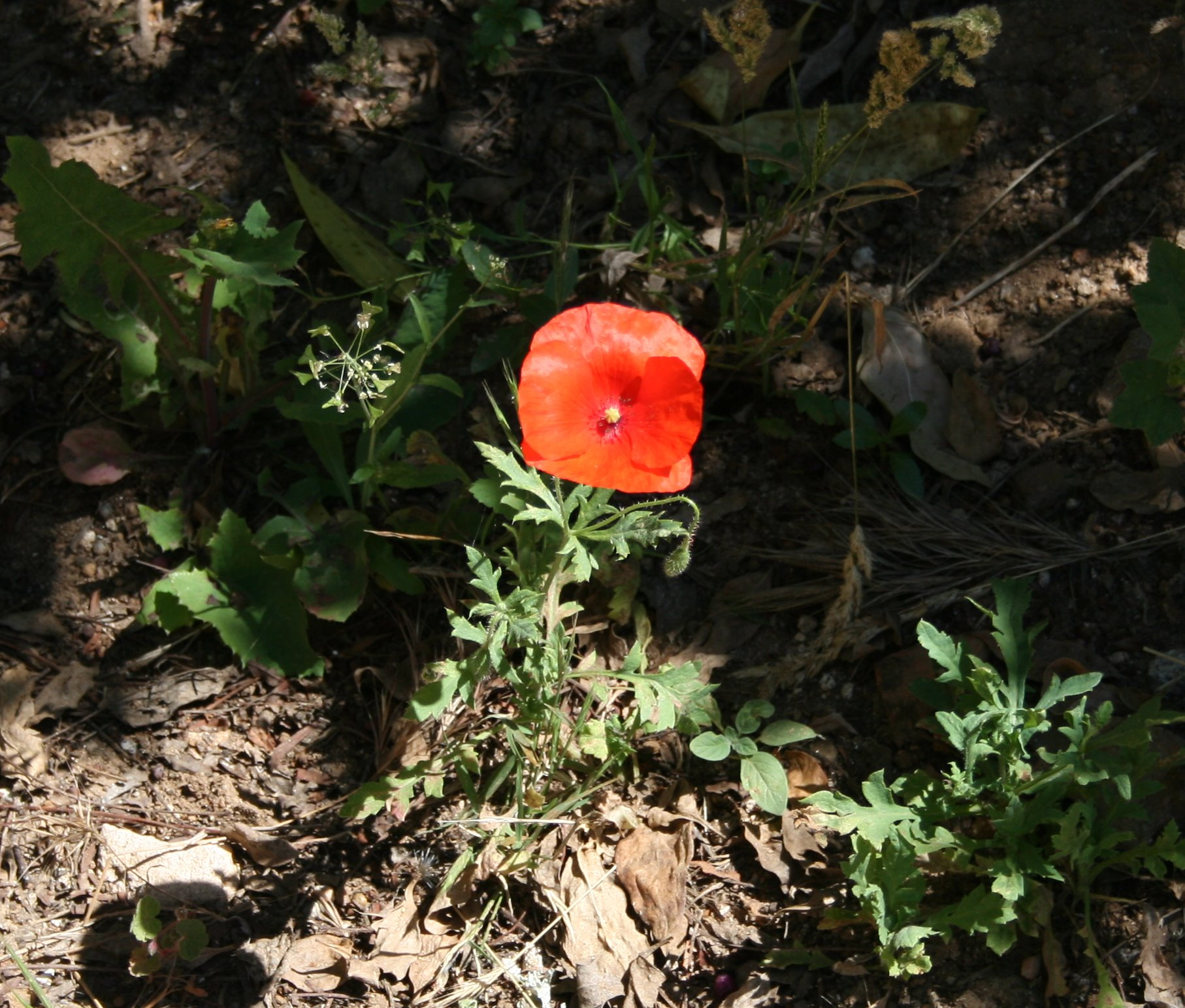 Papoila